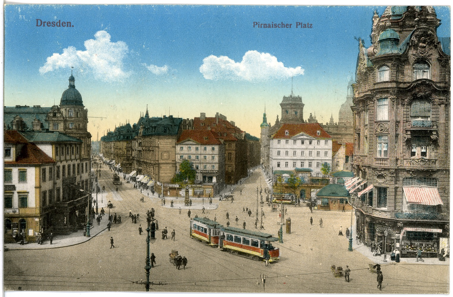 Dresden; Pirnaischer Platz This postcard is from publisher Brück & Sohn in Meißen ( postcard has a unique number 19127 and is available in a higher resolution at the publisher. This images was uploaded in a cooperation project between Wikipedians and the publisher.